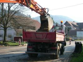 Flüssigboden; Bagger hebt Bodenmaterial auf einer Baustelle aus